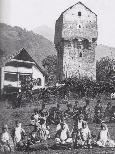 Çingizqala XIX əsrin sonu-XX əsrin əvvəllərində